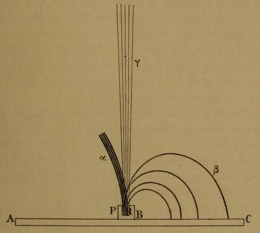 Figure 4 de Recherches sur les substances radioactives, par Marie Curie en 1903